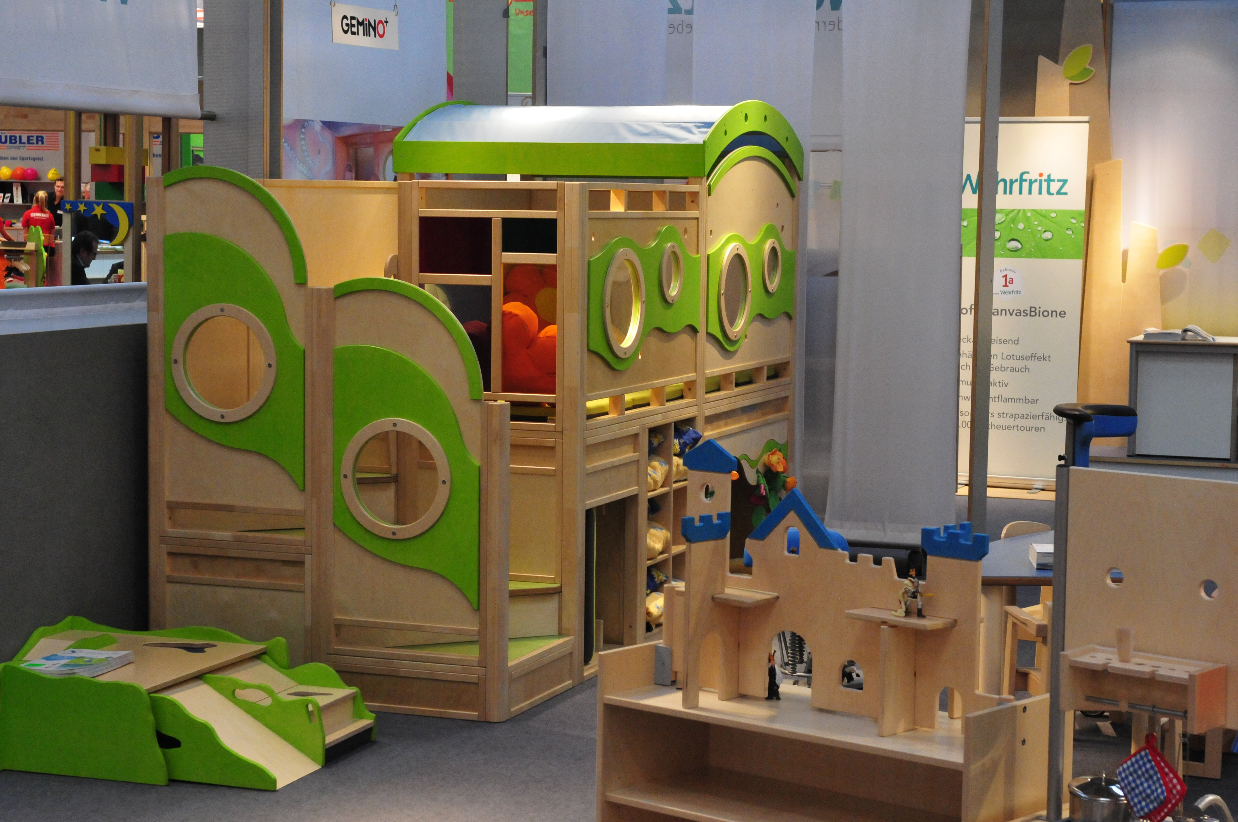 Didacta 2015 in Hannover. Besuch am 26. Februar 2015 in den Messehallen und Außengelände